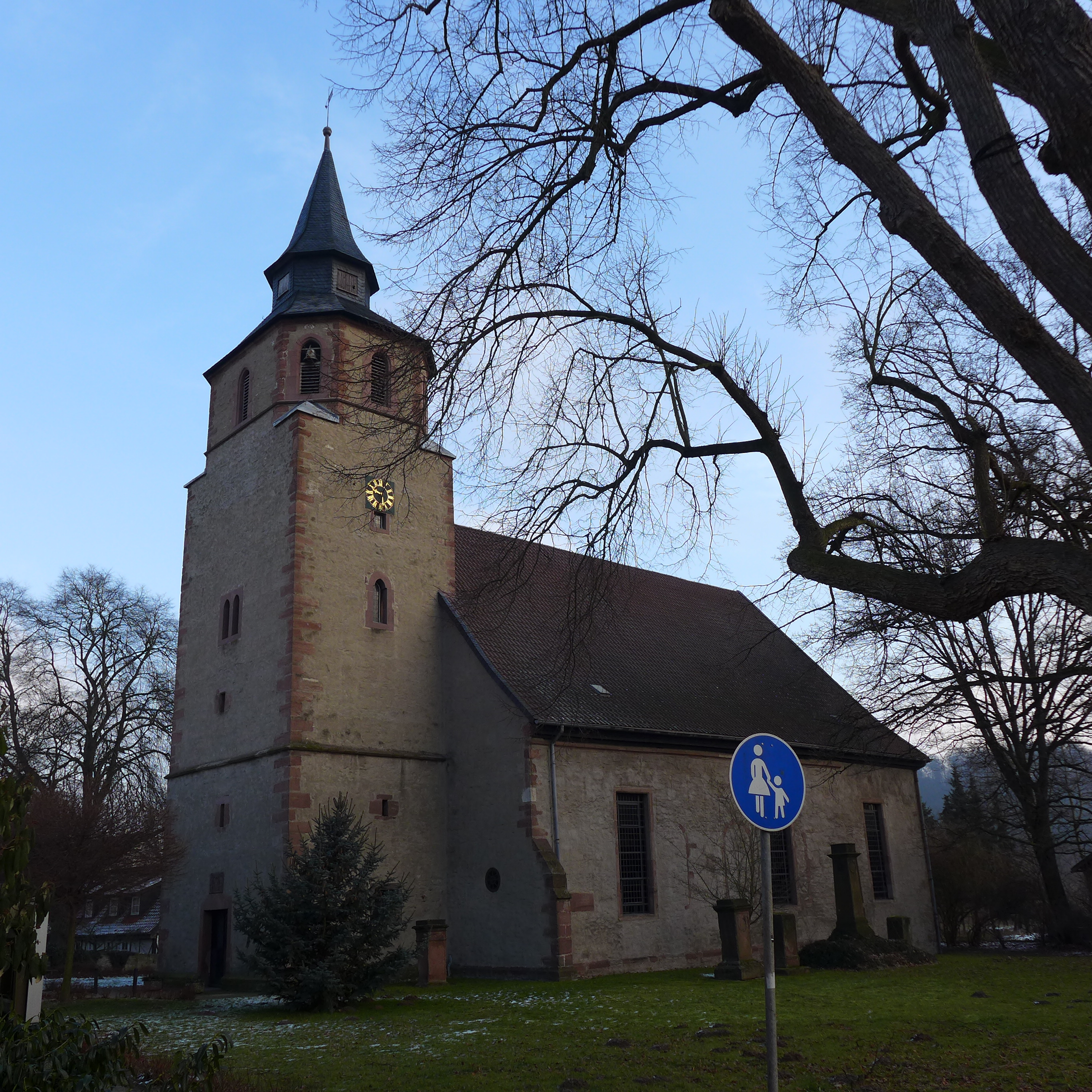 (Anfang 2015)